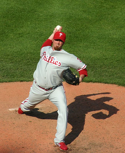 Brett Myers 20:51, 16 November 2007 . . Old man gnar . . 407×500 (141 KB)